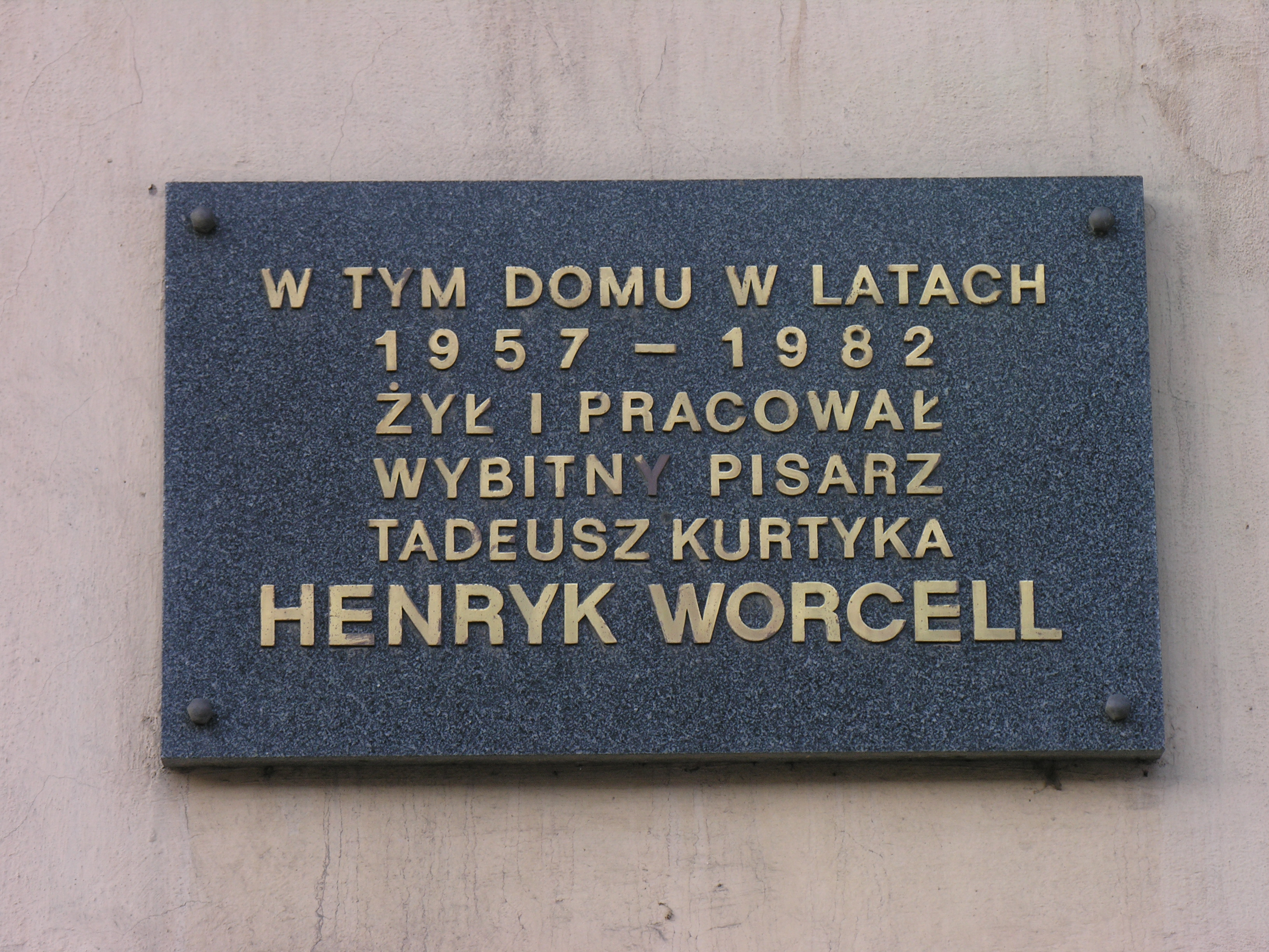 Tablica ku czci Henryka Worcella, Wrocław, ul. Marii Skłodowskiej-Curie 40